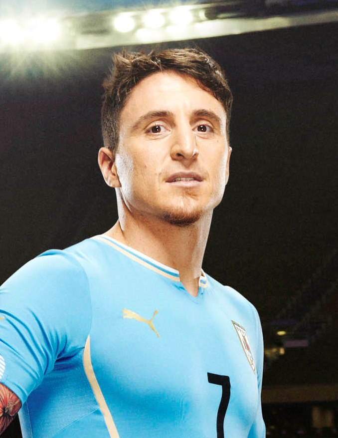 Cristian Rodríguez in 2014.